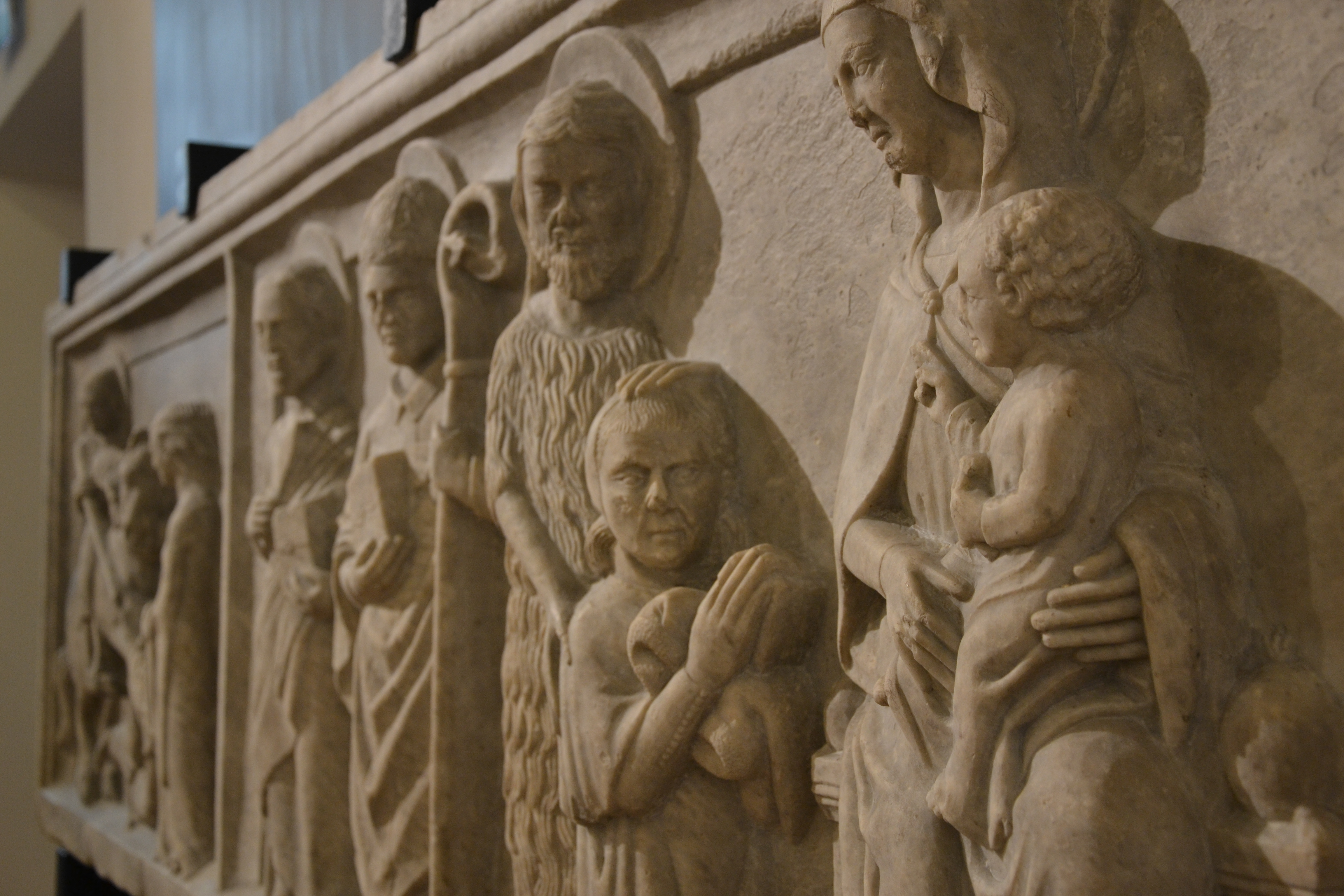 Pinacoteca Civica di Palazzo Volpi a Como